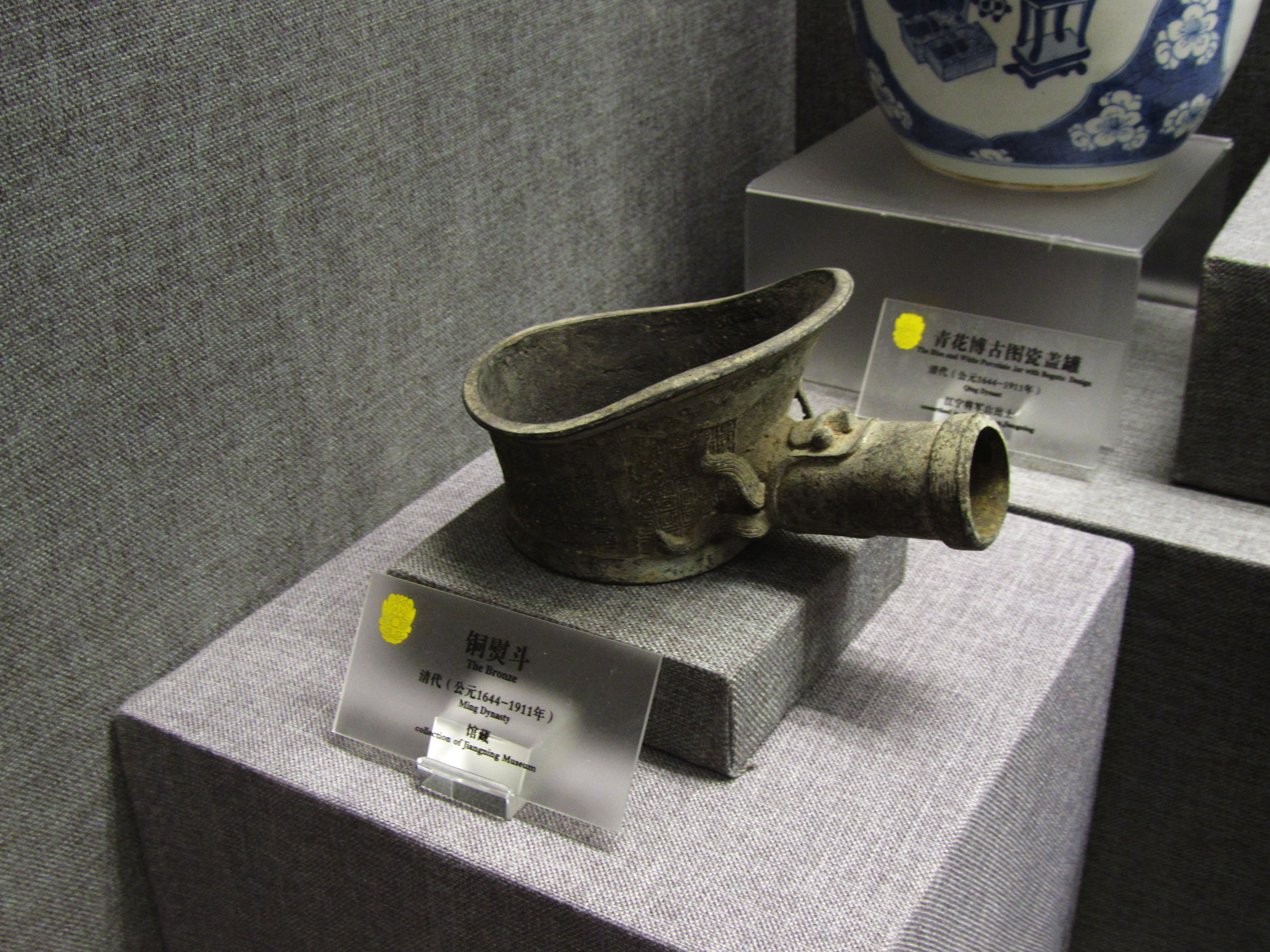 铜熨斗，清。